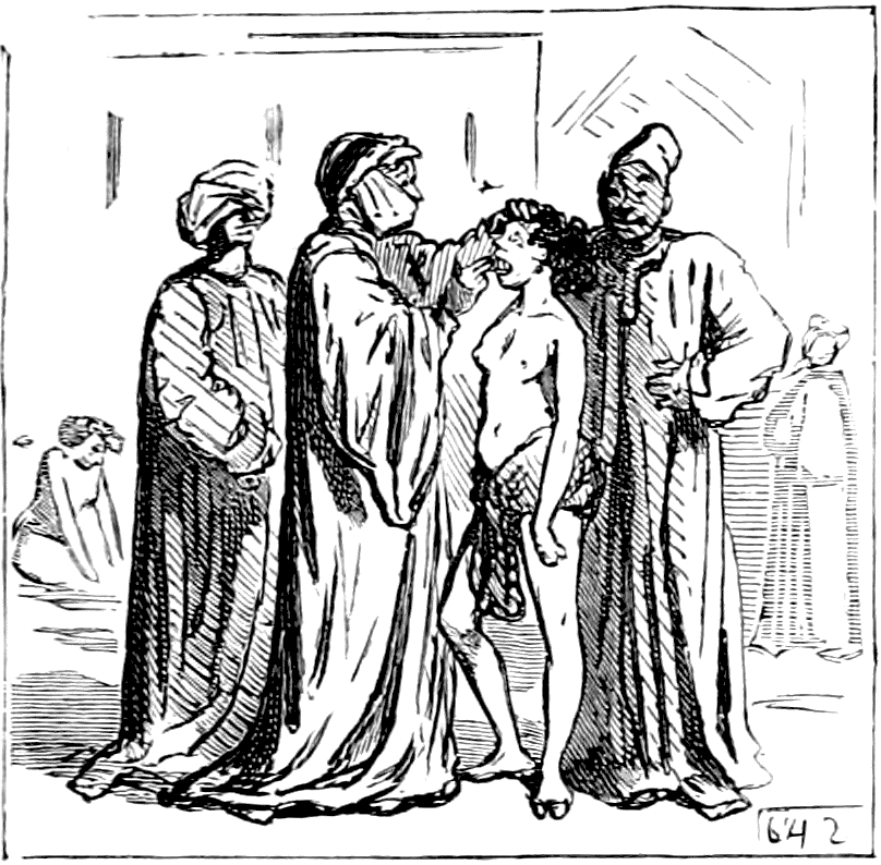 642. — M. GÉROME. Un Arabe qui a mal aux dents achète un esclave pour lui mâcher son dîner.